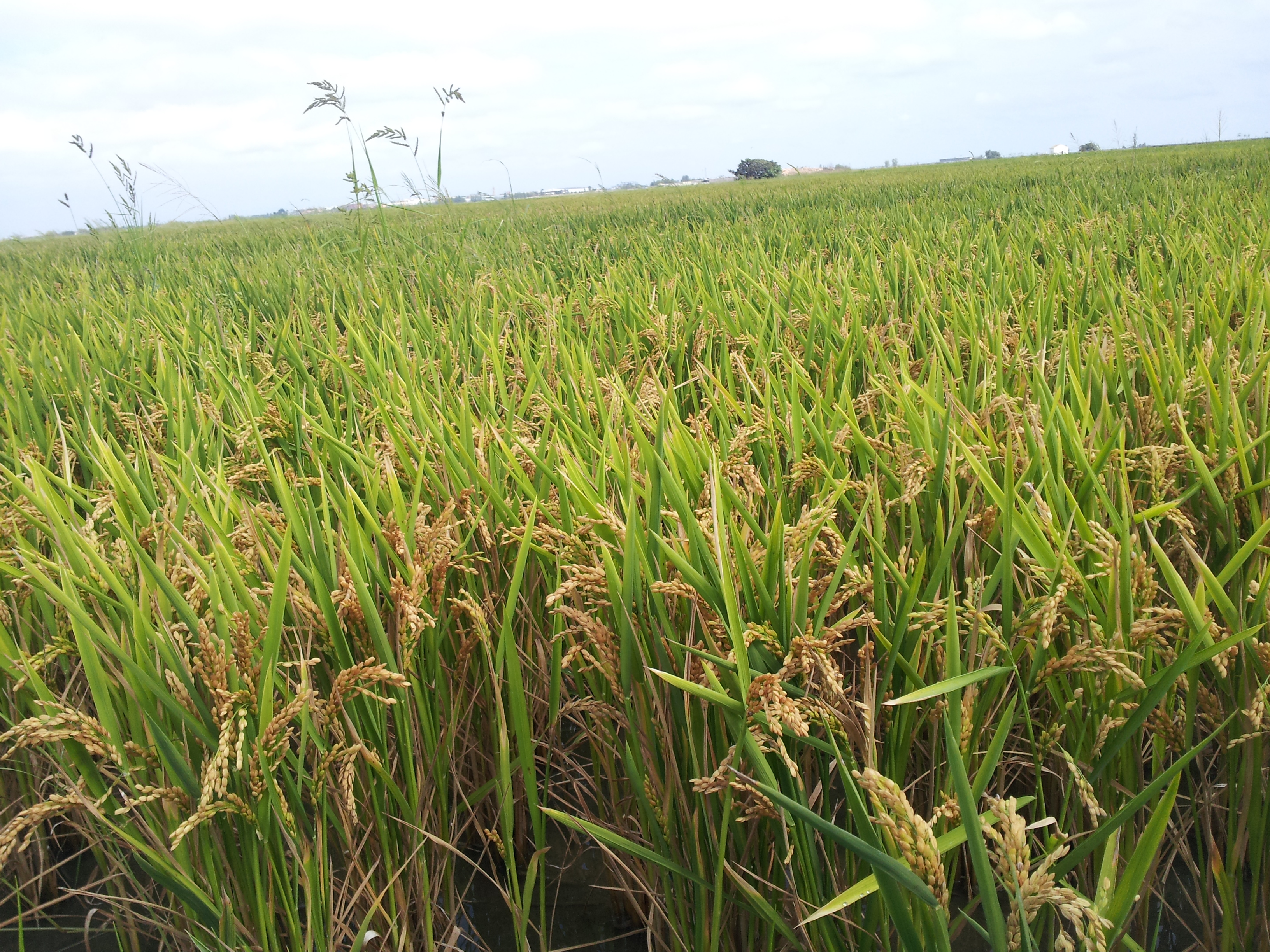 Fonsa? Gleva? Sarcet? amb Serrets al fons.